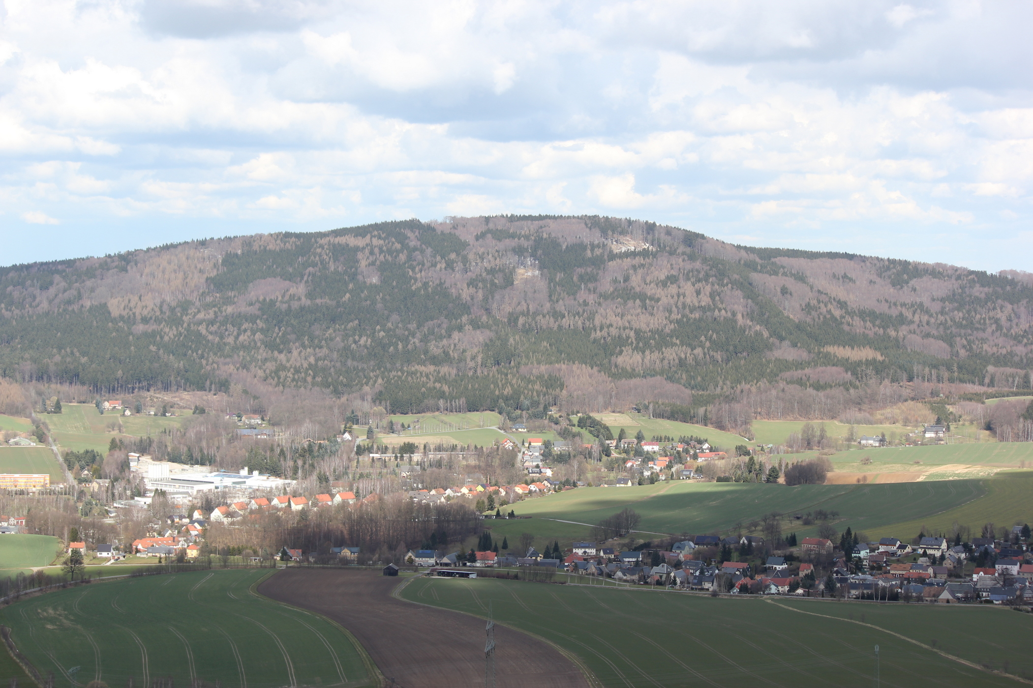 Hornjoserbsce: Wuhlad wot Běłoboha na Čornobóh.